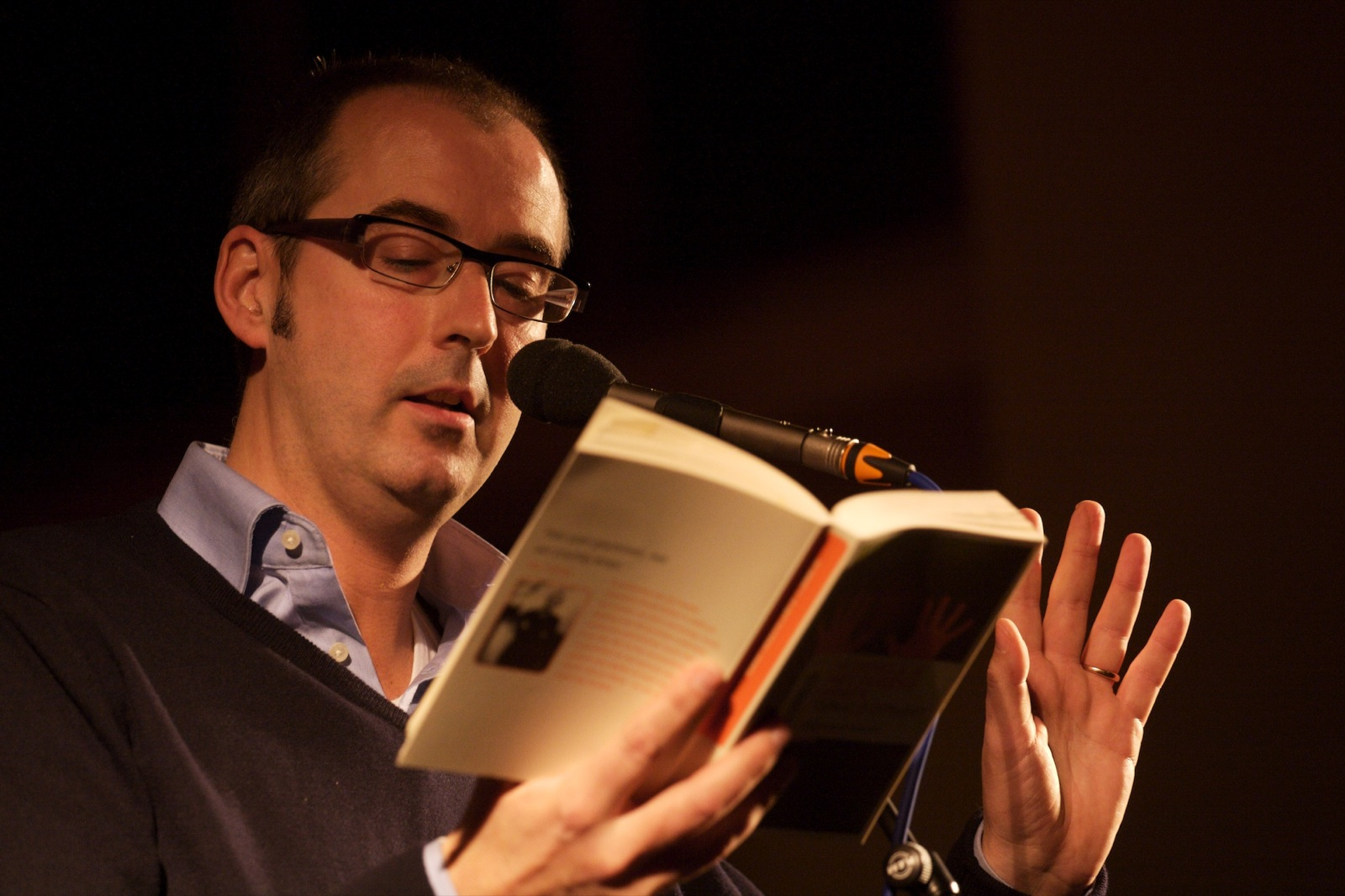 Ronald Giphart bij Mooie Woorden Festival 2007